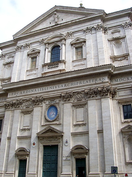 Roma - Chiesa di S. Carlo ai Catinari